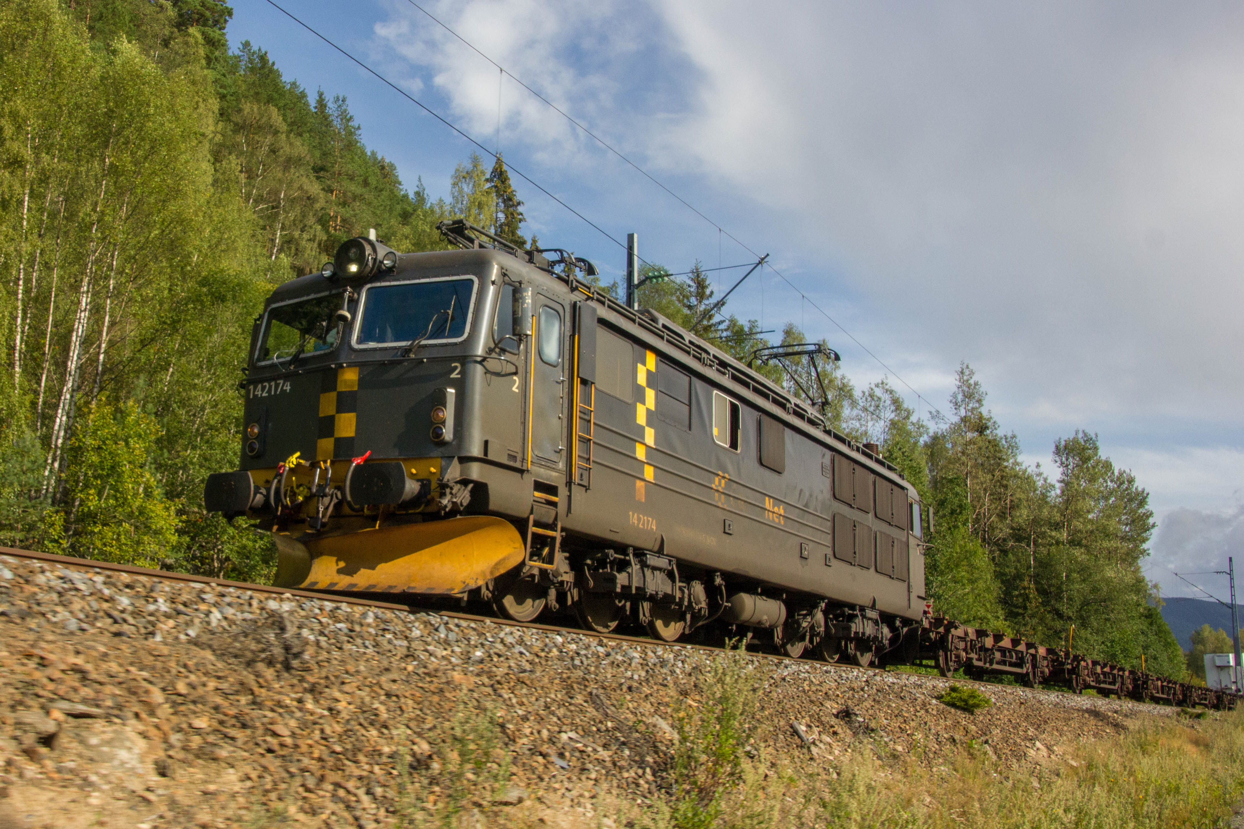 EL 14-2174 med CargoNet farger et stykke nord for Holtsås stasjon på Sørlandsbanen.